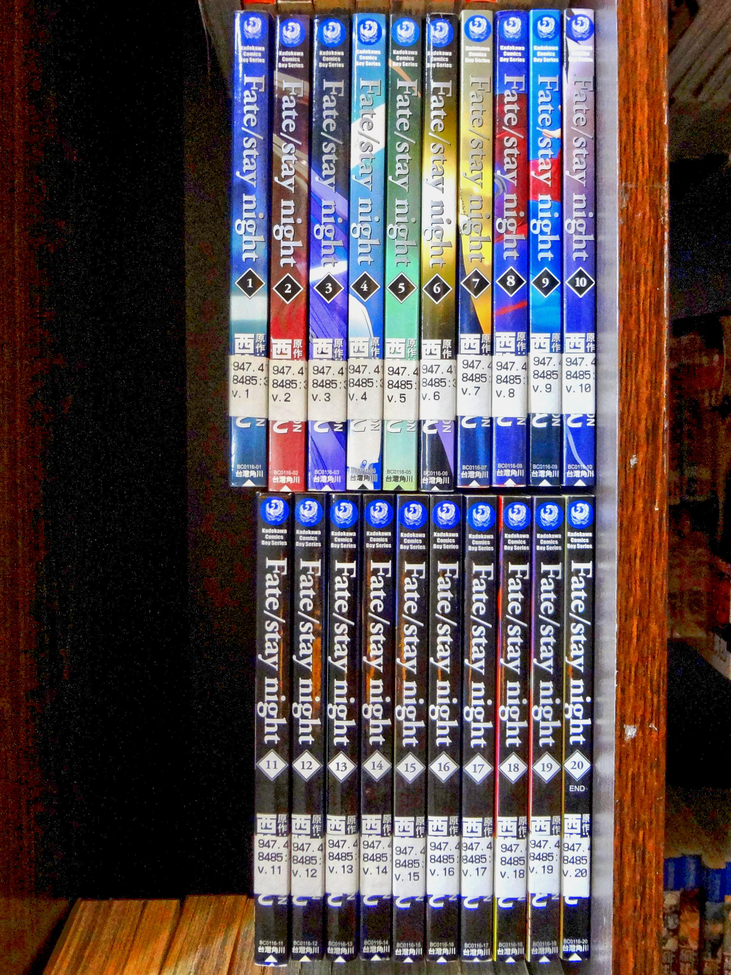 中文（台灣）: 中華民國國家圖書館藝術暨視聽資料中心漫畫屋收藏的台灣角川《Fate/stay night》中文版全套單行本書背。 中文（中国大陆）: 中华民国国家图书馆艺术暨视听资料中心漫画屋收藏的台湾角川《Fate/stay night》中文版全套单行本书背。